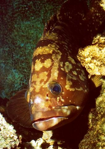 Area Marina Protetta Capo Gallo, Palermo, Sicily Epinephelus marginatus